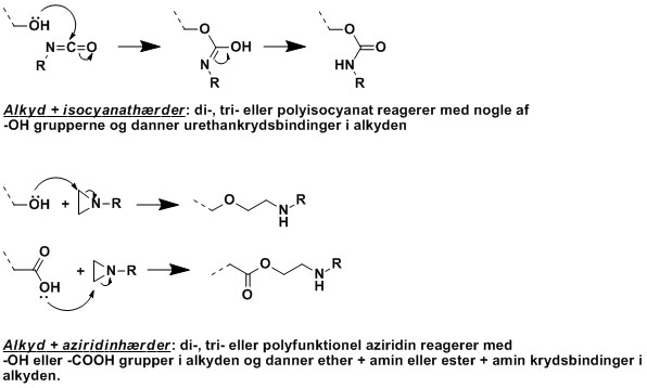 Reaktion mellem alkyd og hærdere